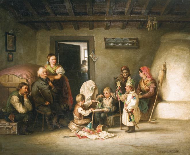 Böhm Pál. Betlehemes készülődés, 1870